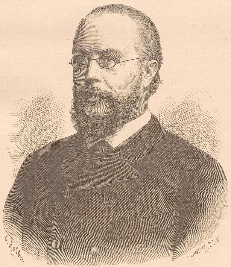 Wilhelm Scherer. In: Illustriertes Unterhaltungs-Blatt: wöchentliche Beilage zum Darmstädter Tagblatt. Darmstadt, 1893